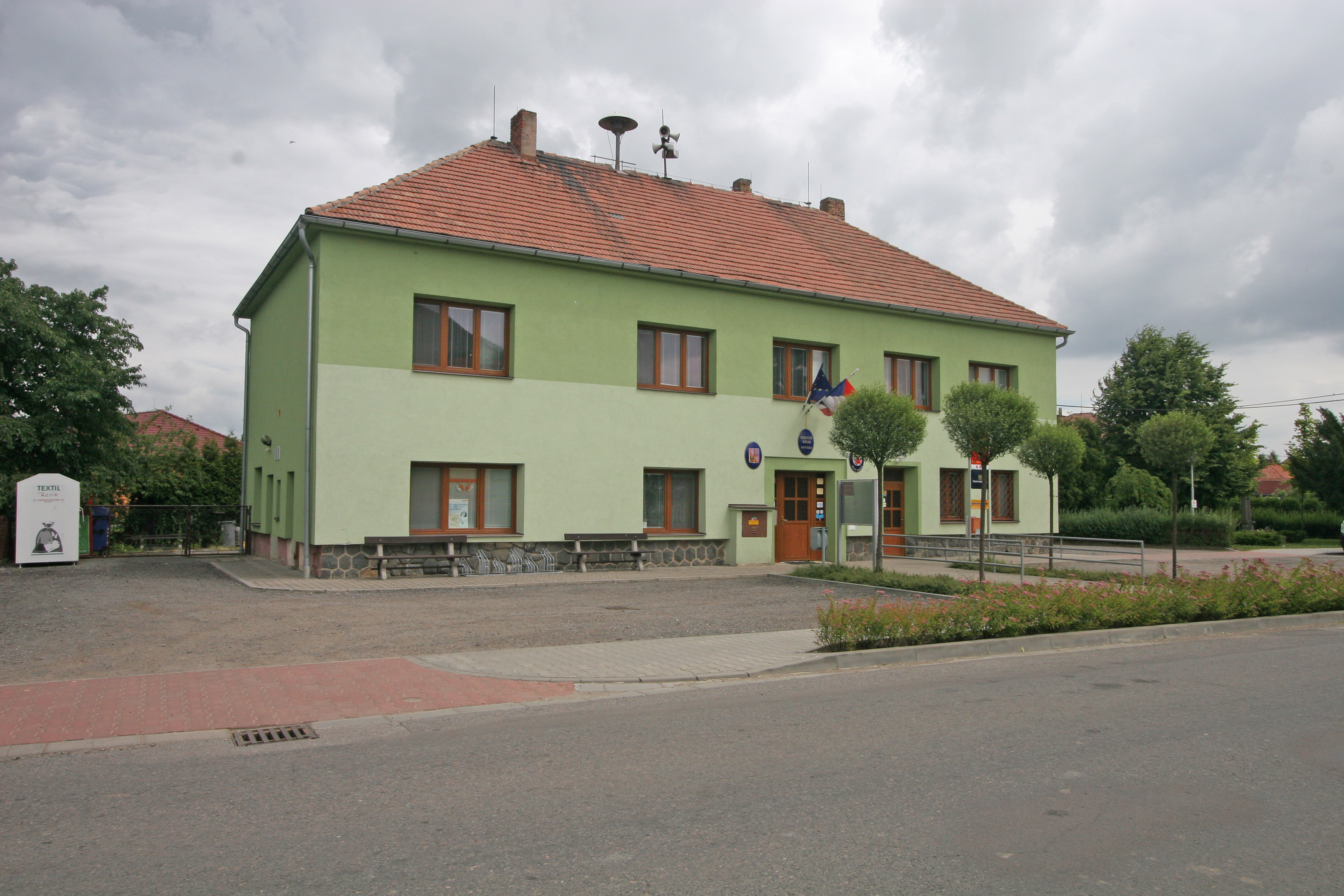 Dolní Ředice obecní úřad